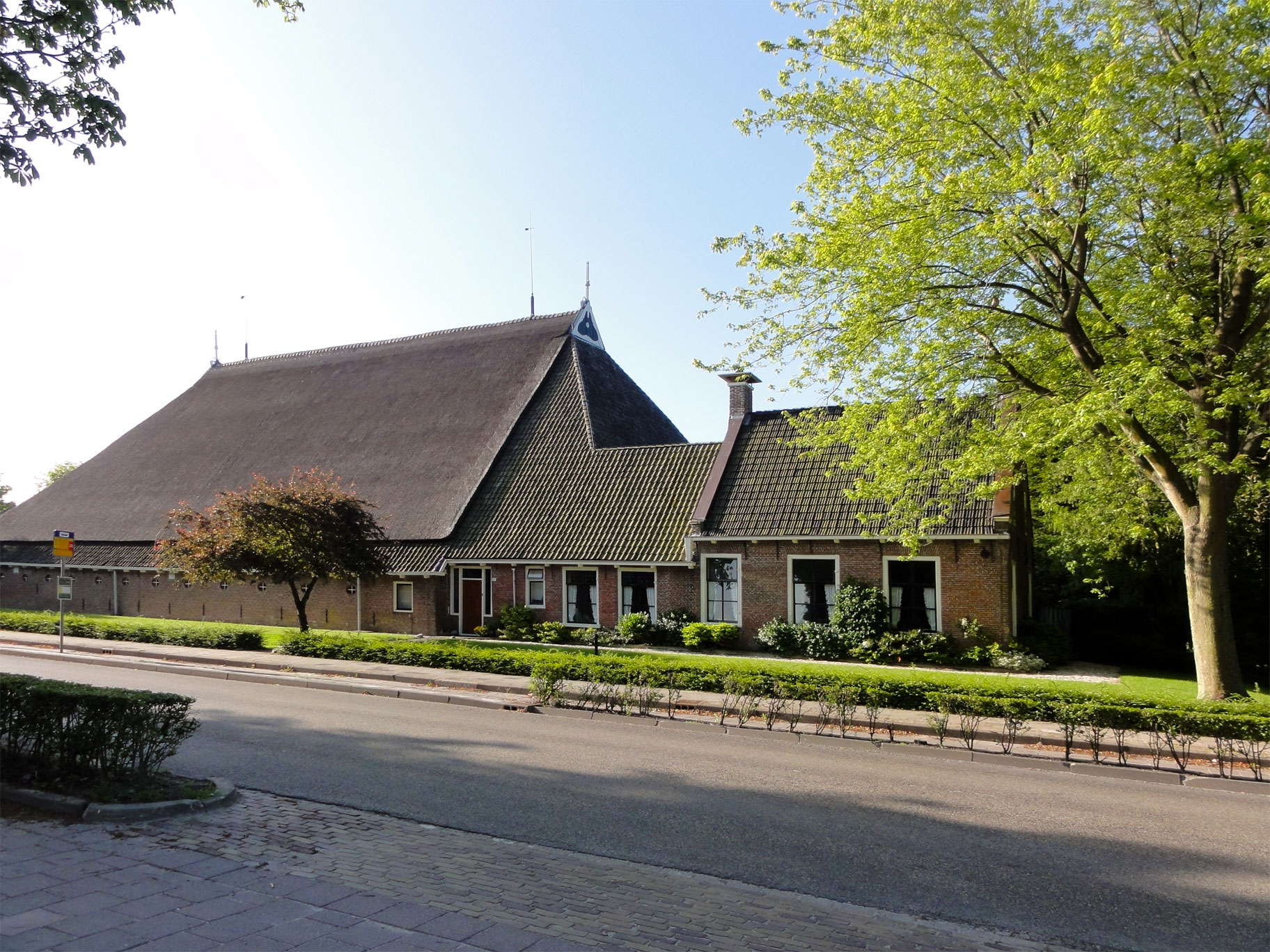 Middelweg-Oost 157 in Sint-Annaparochie